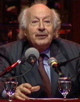 Max Milner (1923-2008), critique littéraire français - conférence du 19 mars 2007 à l'« Espace Liberté » d'Aubervilliers (France), dans les cadre des « Lundis du Collège de France » à Aubervilliers.